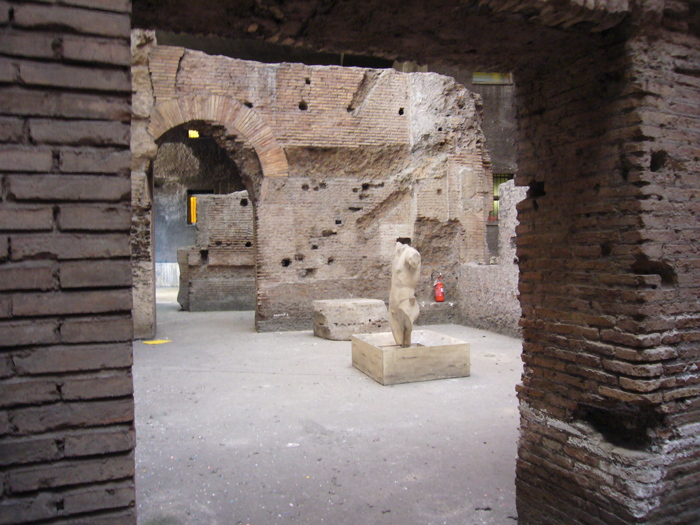 Roma, stadio di Domiziano